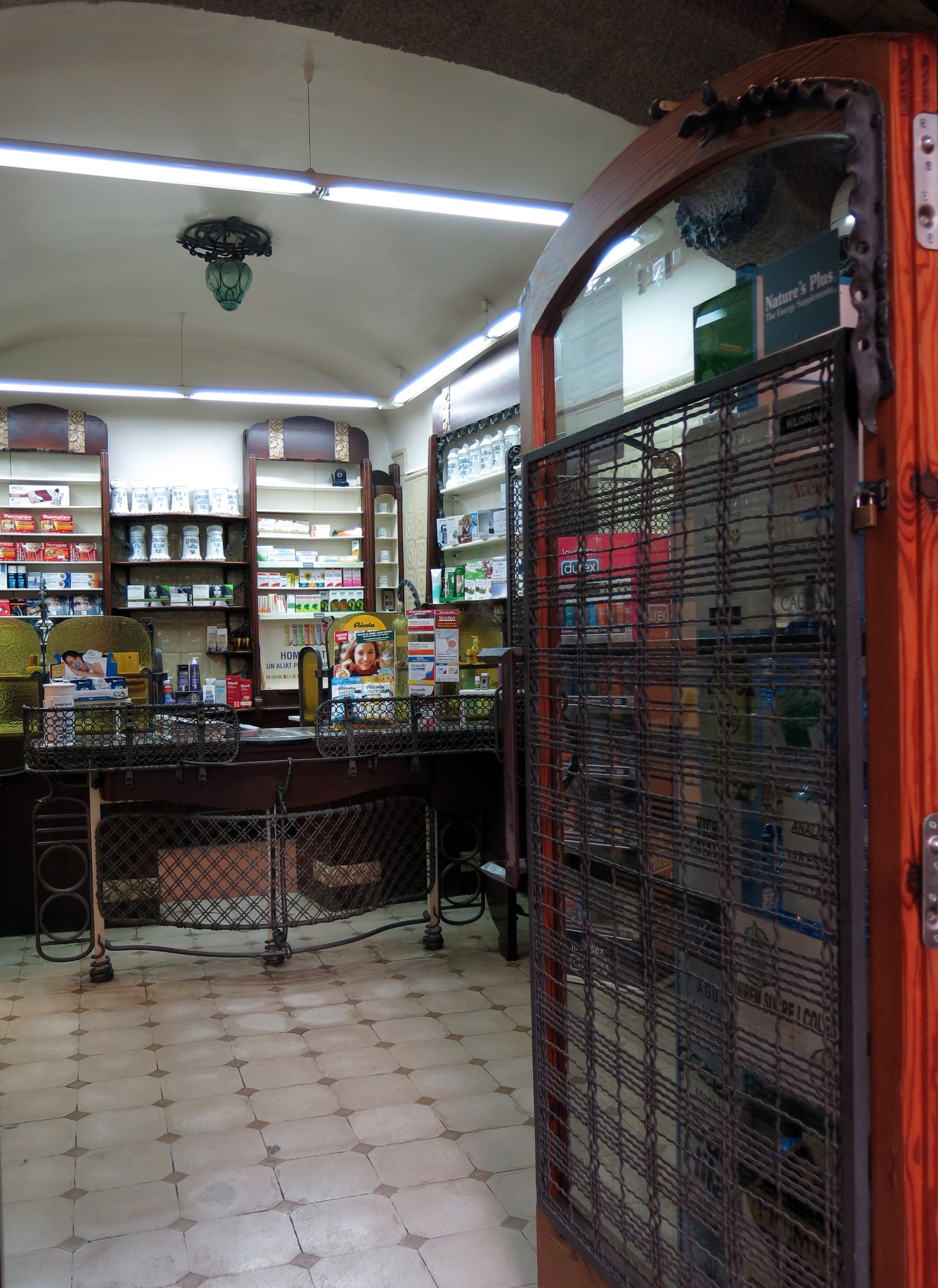 Farmàcia Saguer (Girona).